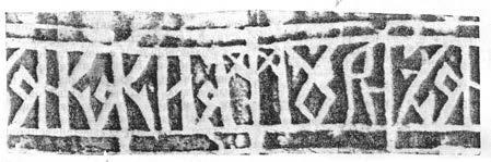 Резьба на ноже из залива Симса «С большей или меньшей вероятностью можно прочитать начало надписи как Акакиа» . Второе слово начинается, ещё более гадательно. буквами М. У и Р Это одна из уникальных находок из загадочной экспедиции русских на Таймыр XVII века, найден в ряду других предметов в развалинах избы на берегу залива Симса моря Лаптевых. Взято из книги Ю. В. Чайковского «Мысы Ледовитого напоминают» М, 2015